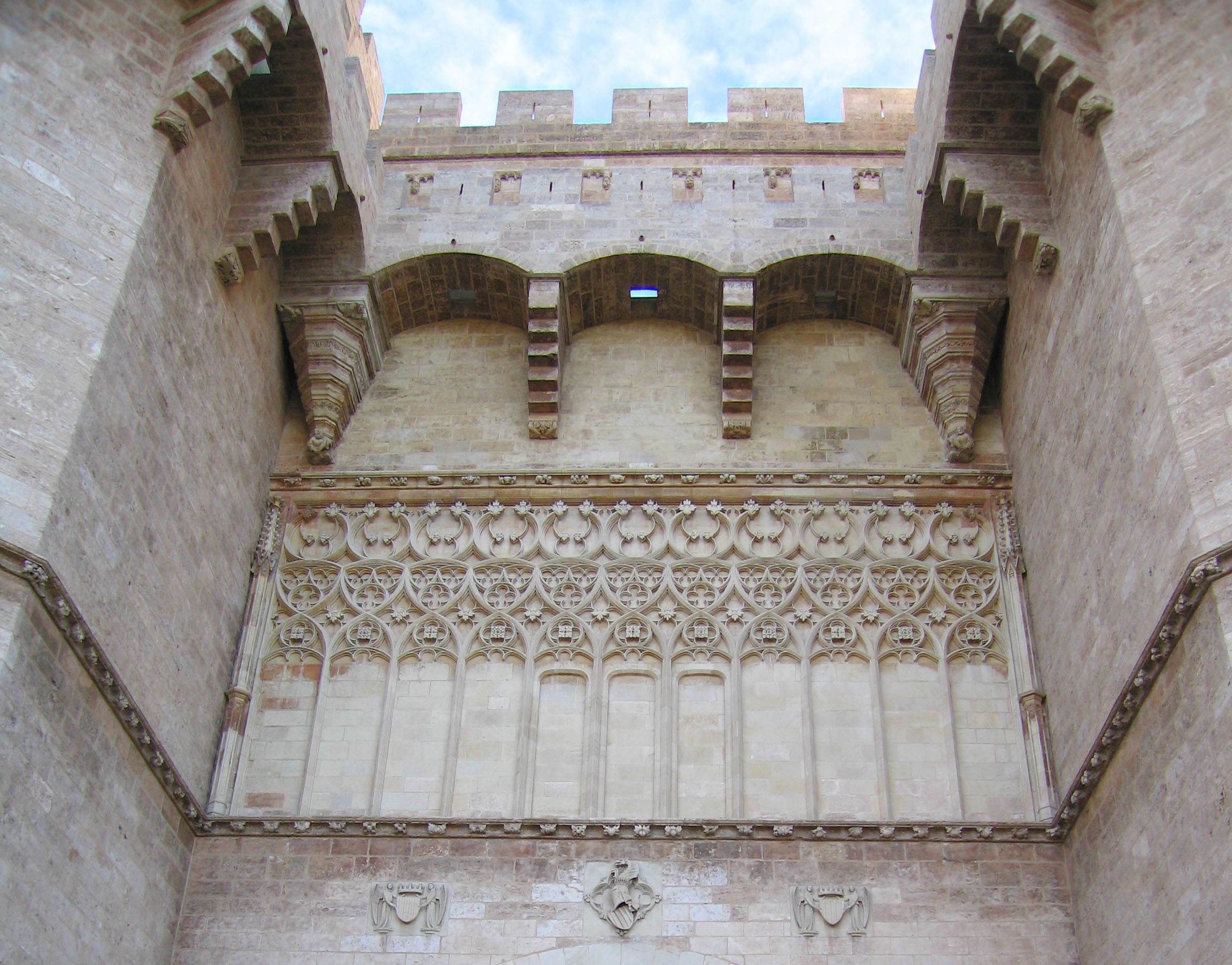 Torres de Serrans (València)